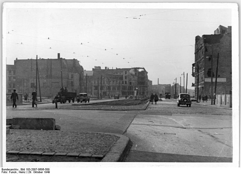 Berlin 1949: Die Gr. Frankfurter Straße - Blick von der Kreuzung Andreasstraße in Richtung Alexanderplatz. Aufn. Illus Funck 4248-49 2 29.10.1949